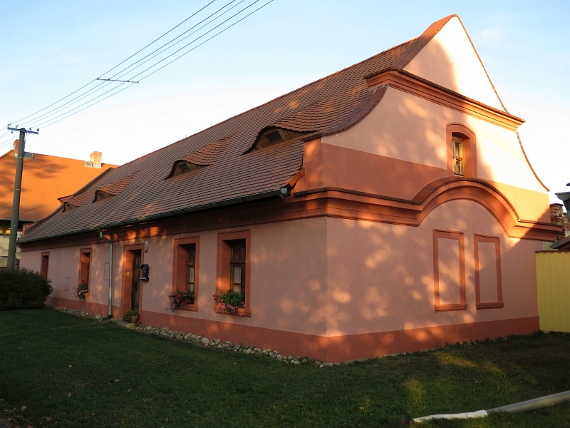 Bednárna pro zámecký pivovar, Křimické náměstí 55, Křimice.